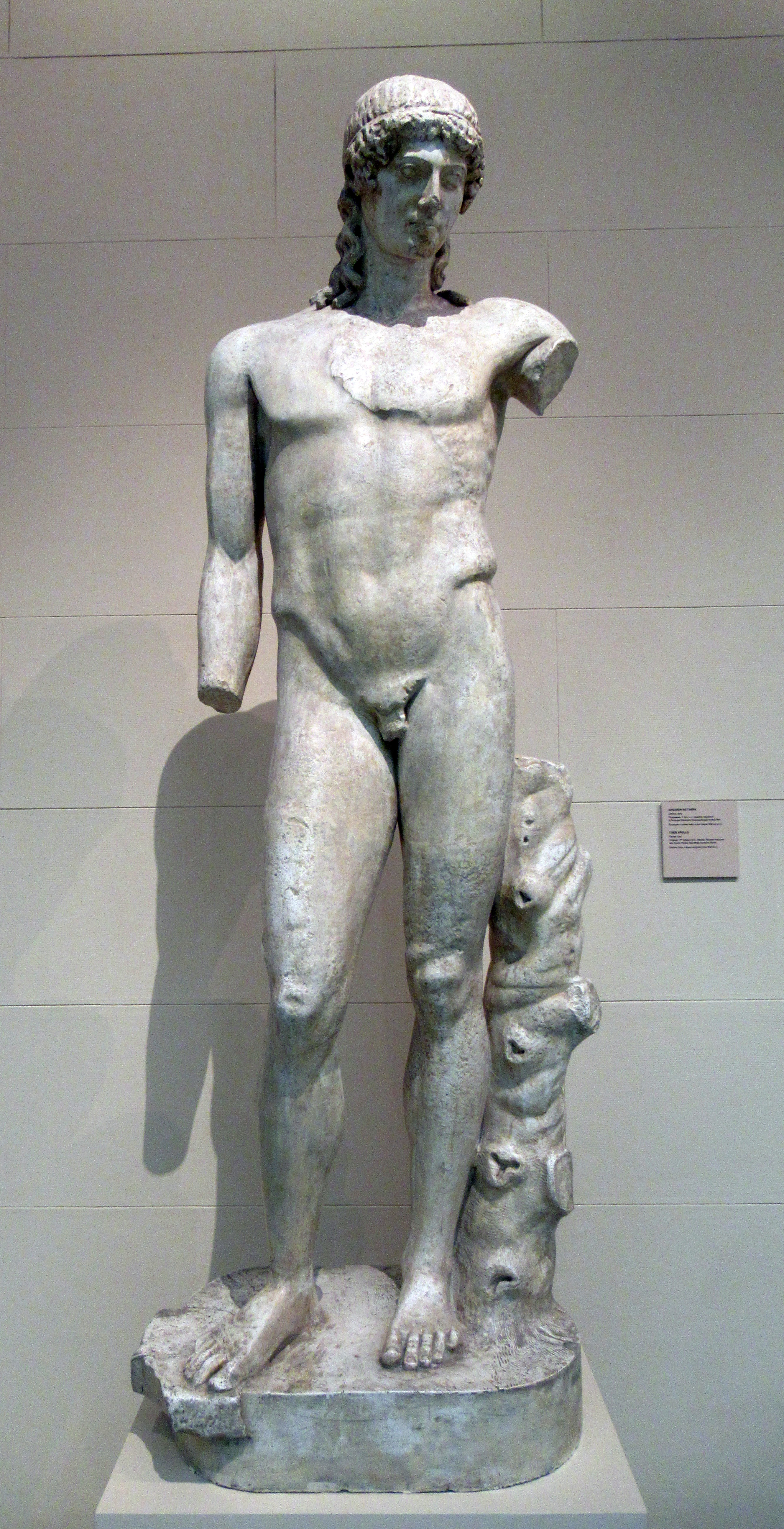 Tibro Apollo